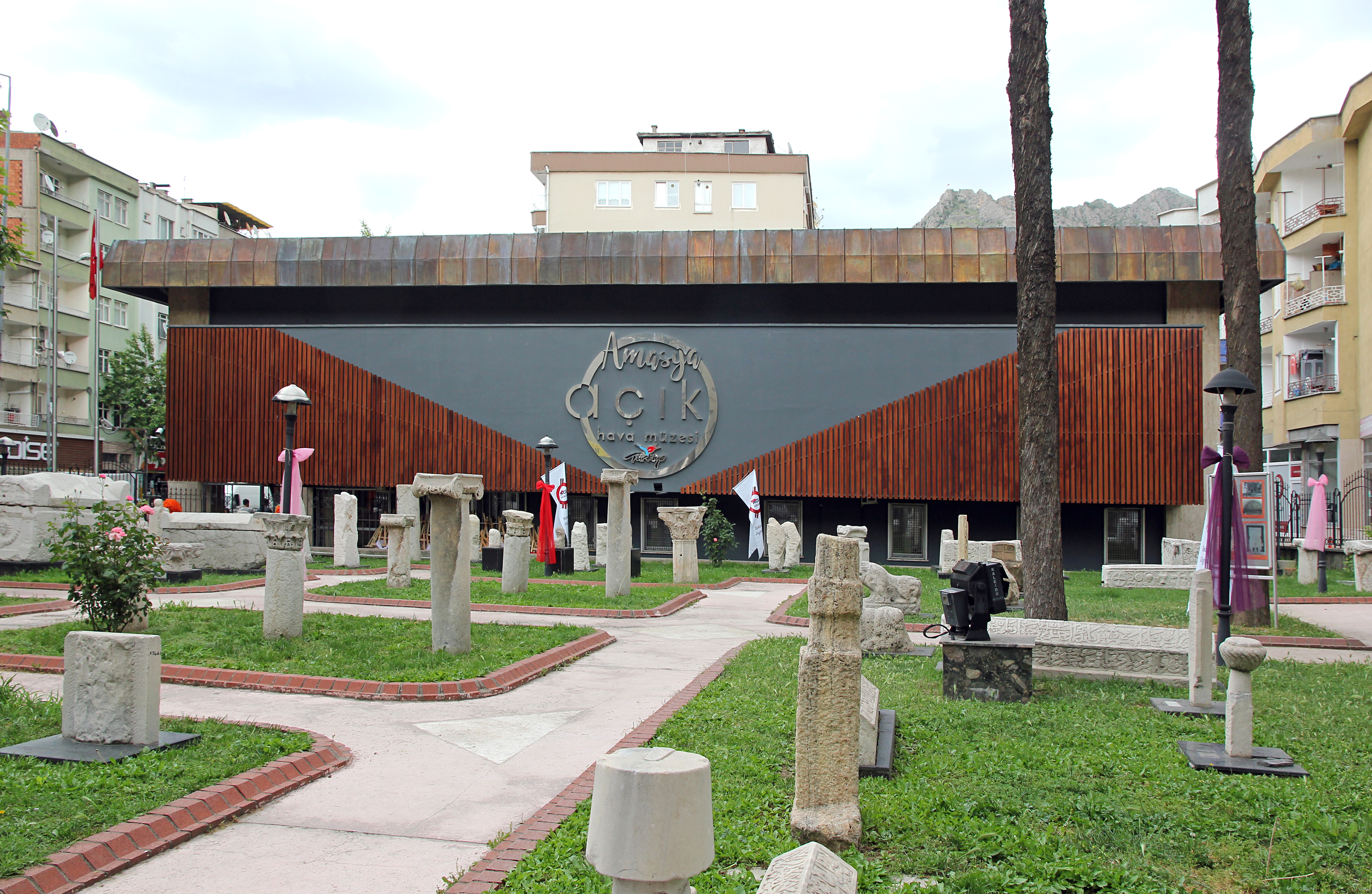 Archäologisches Museum Amasya, Nordtürkei